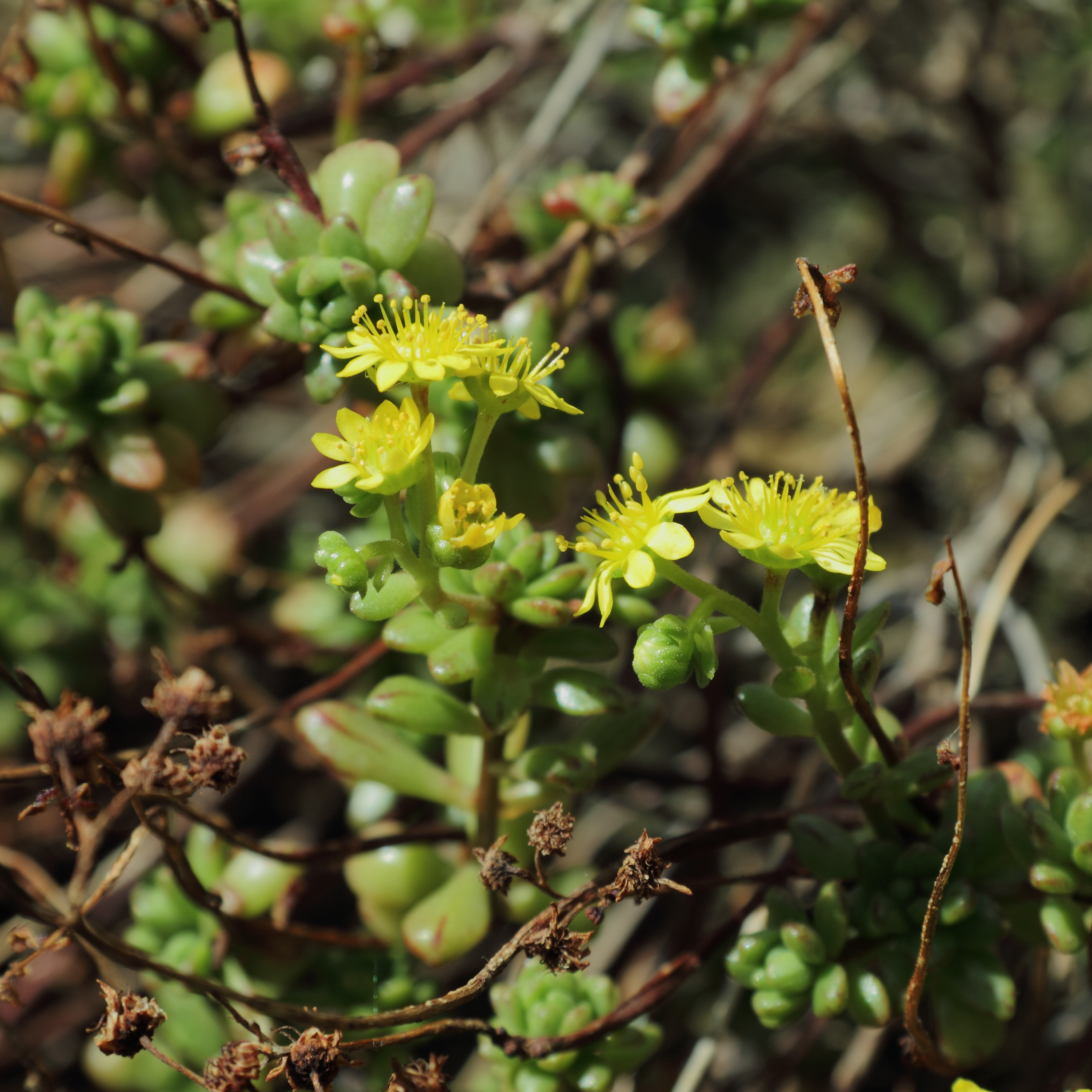 Aeonium sedifolium , identifierad med hjälp av befintlig skylt vid Bergianska trädgården.